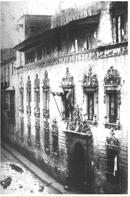 Una de les poques fotografies que es conserven de la casa Gralla poc abans de ser enderrocada